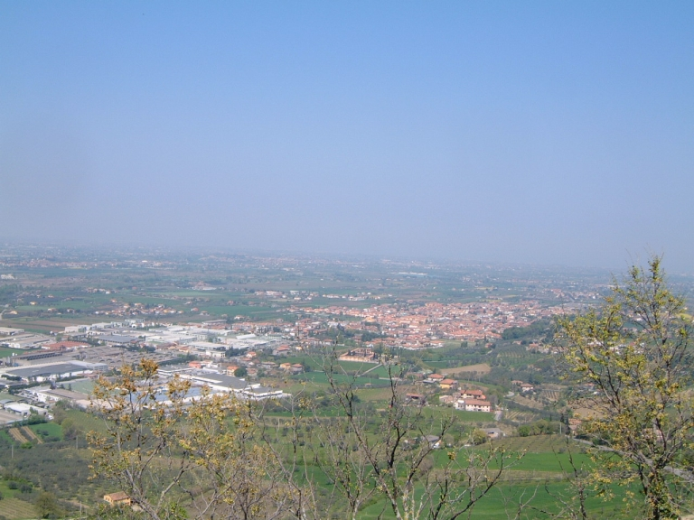 Vue depuis le haut de Verucchio de la plaine du Marecchia qui s'étend jusqu'à Rimini, Italie